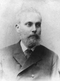 Ctibor Helcelet